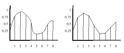 Vasakul kujutatud originaalset analoogsignaali. Paremal kujutatud rekonstrueeritud pidevsignaali, kus näha vähestest sämplitest tingitud diskreetmoonutusi.